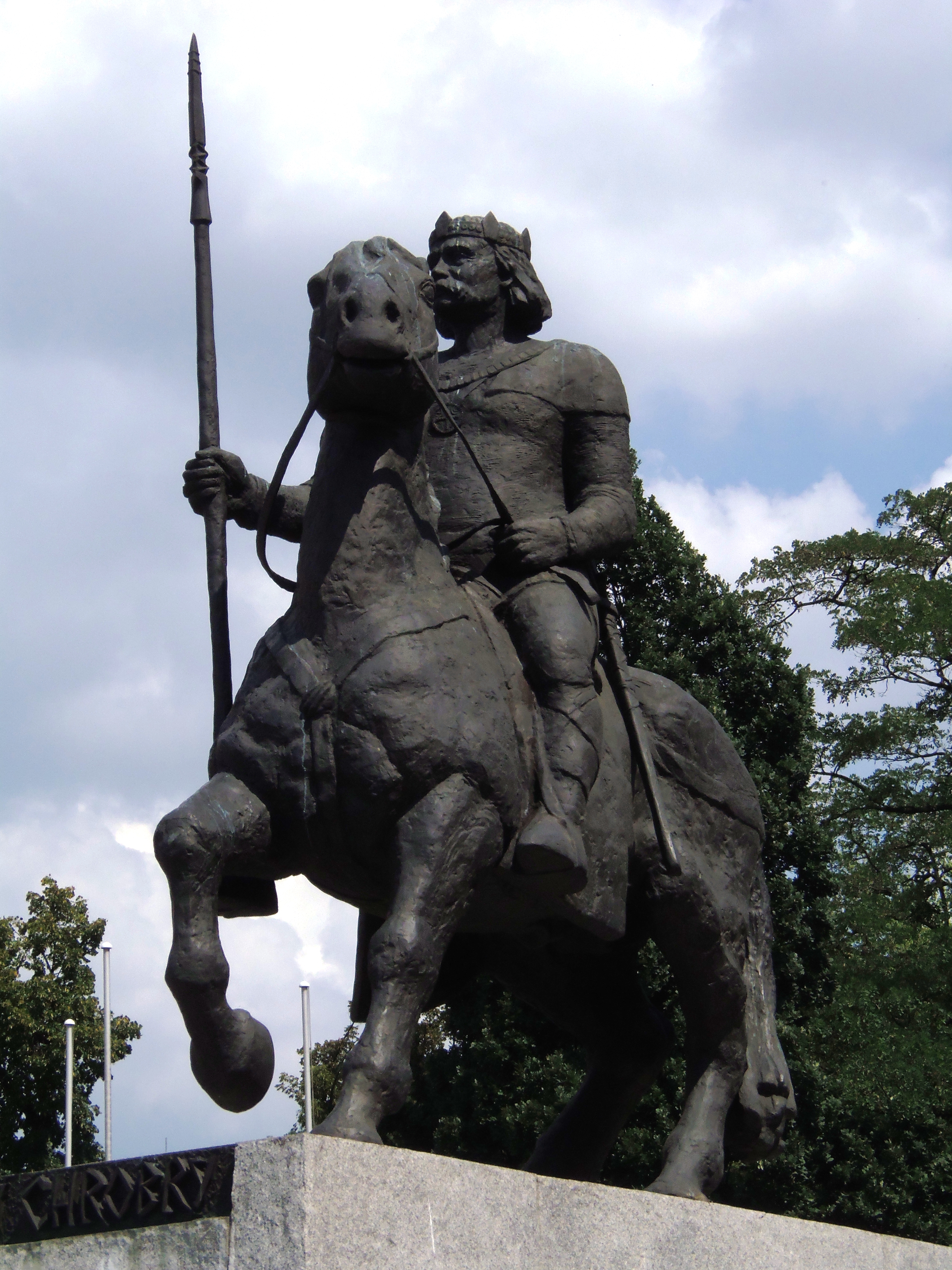 fot. pomnik Bolesława Chrobrego we Wrocławiu English | polski | +/−